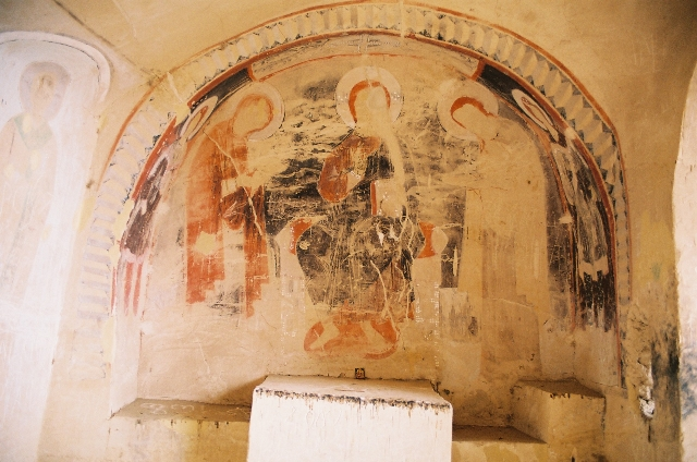 დავითგარეჯა. უდაბნო. კედლის მხატვრობა